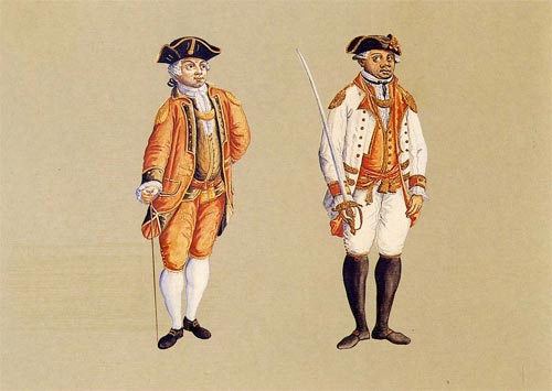 Álbum de aquarelas sobre uniformes militares do período colonial brasileiro, provavelmente do século XVIII, de várias regiões do país.